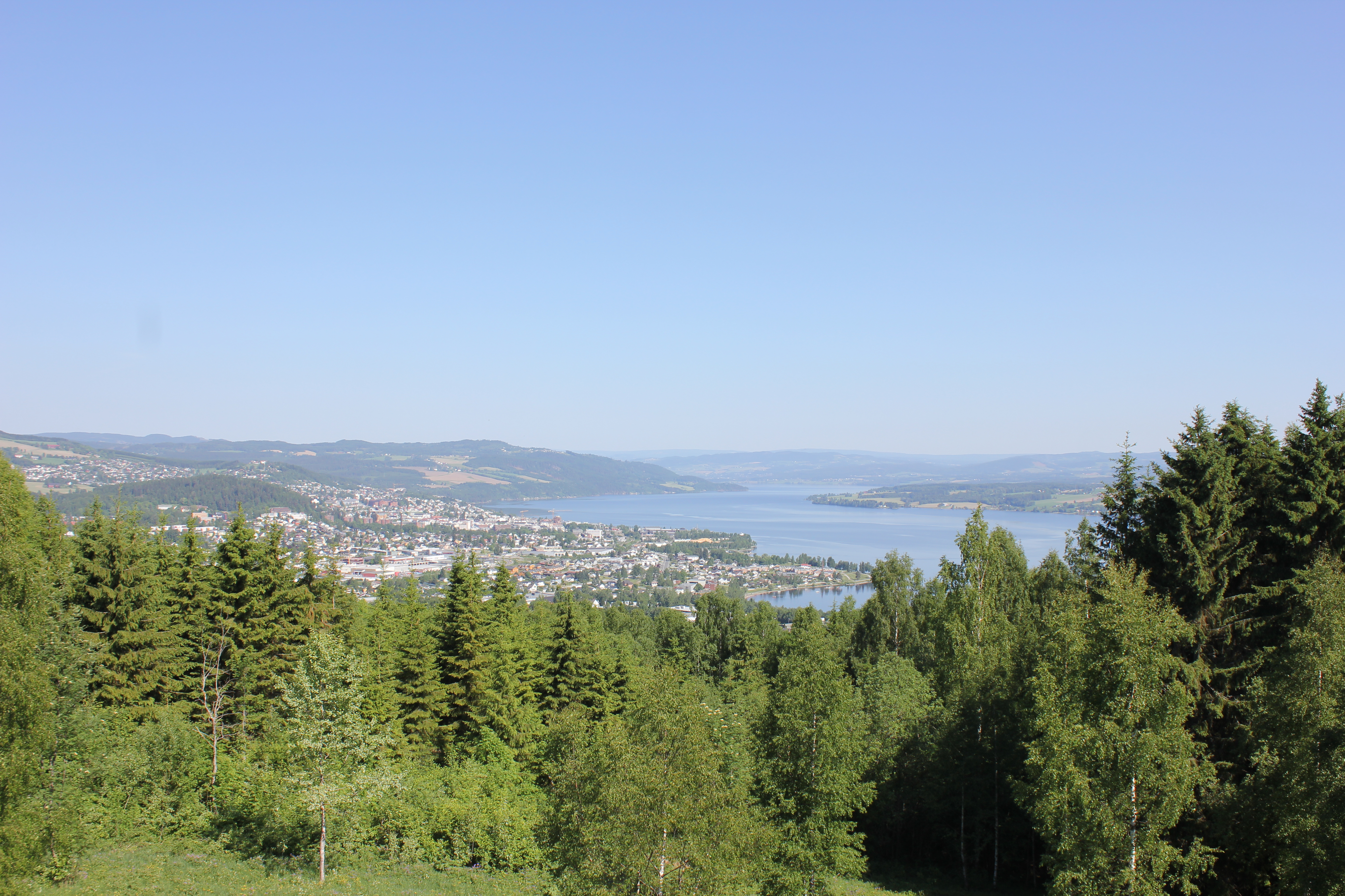 Bild vom Aussichtspunkt über Gjøvik an der Straße Nye Vestre Totenveg